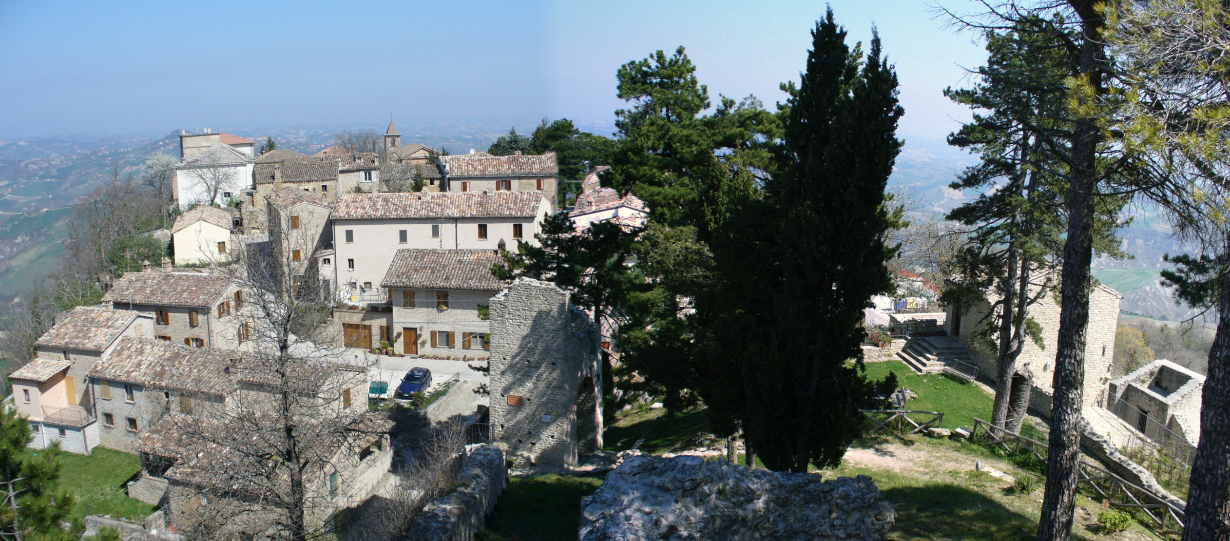 Original (2524 x 1110)